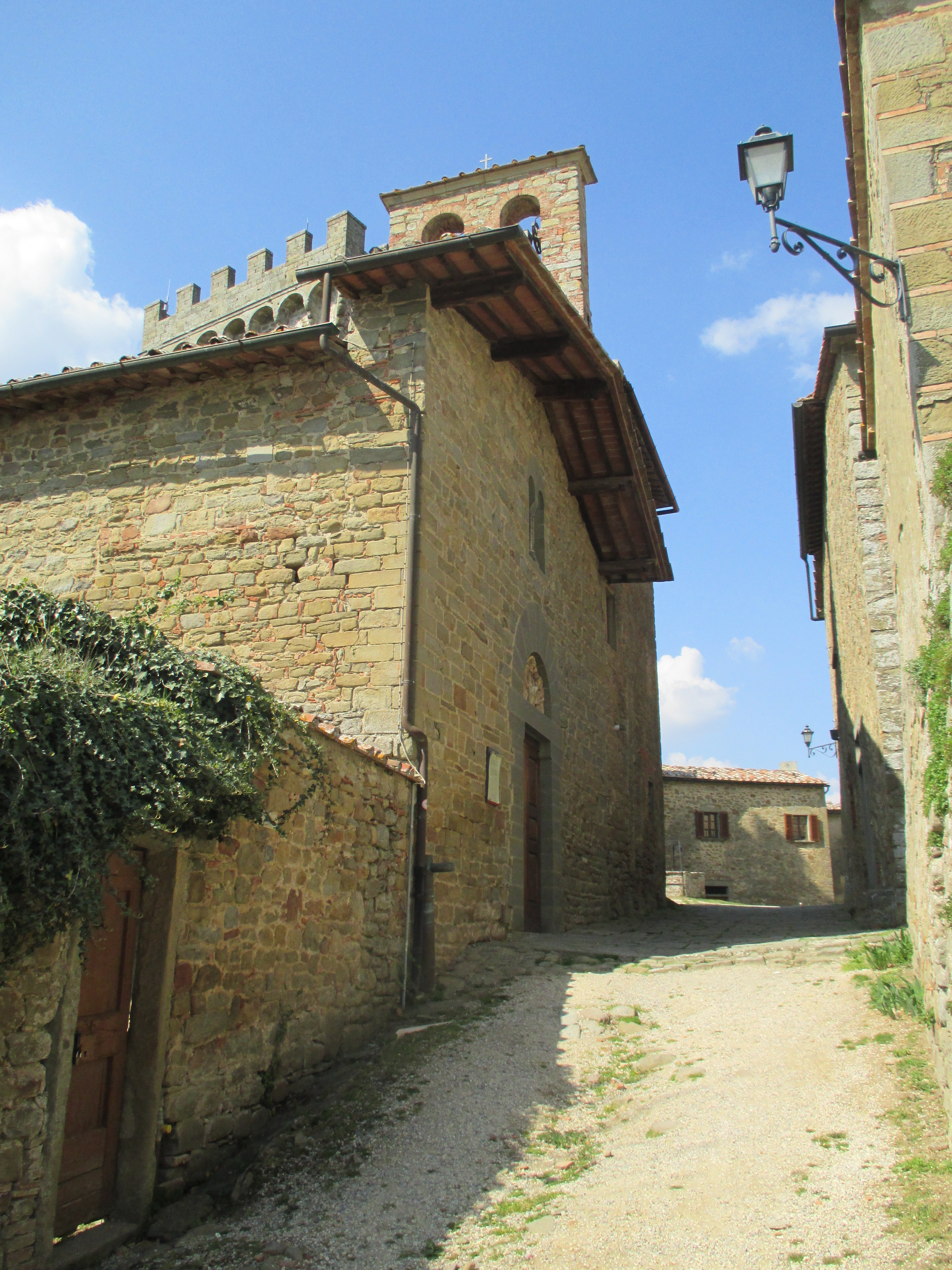 Gargonza (AR): chiesa dei Santi Tiburzio e Susanna, ubicata all'interno del castello medievale.